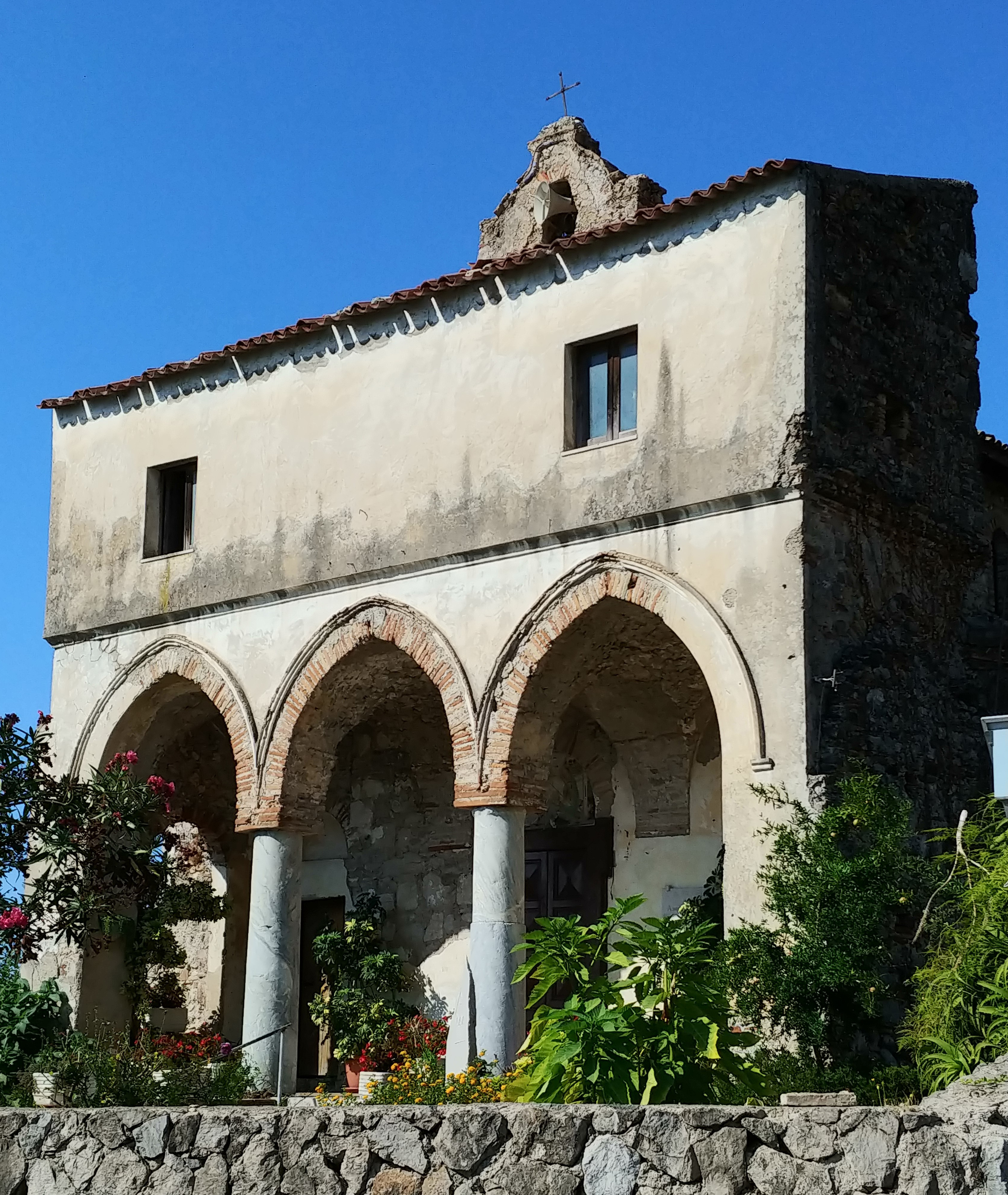 Facciata.